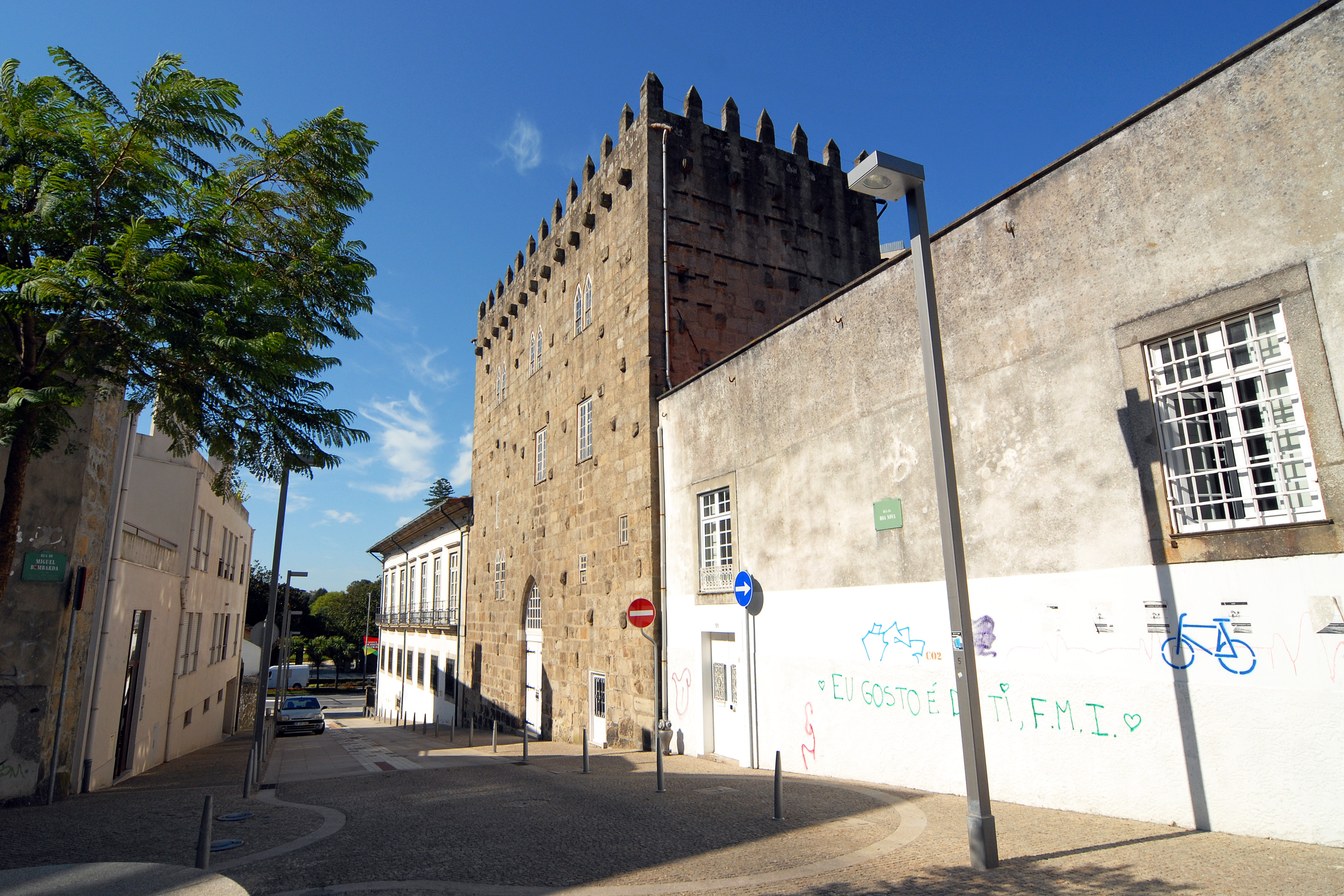 Torre do Palácio dos Terenas ou Torre de Pedro-Sem This file was uploaded for Wiki Loves Monuments in Portugal with the unique identifier 70203.